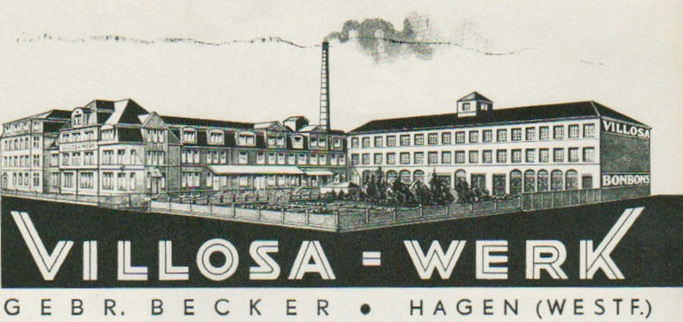 Werbung der Villosa-Werke in den 1930er Jahren in Anzeigen und Briefköpfen der Firma